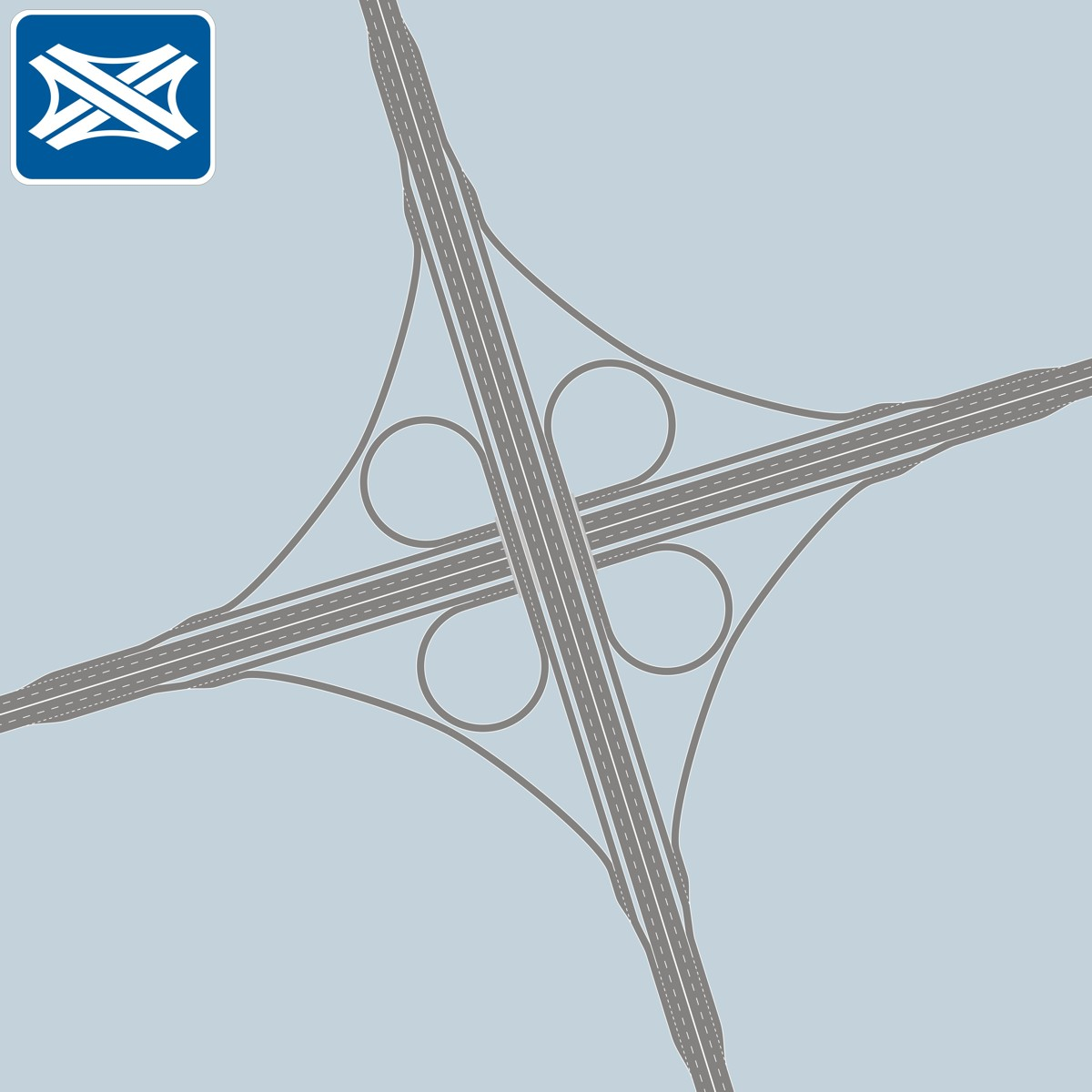 Detailzeichnung Autobahnkreuz "Kleeblatt" Hinweise an Löschantrags-Fanatiker: Sollte in der Abbildung des Motivs ein Urheberrecht als verletzt angesehen werden, bitte ich um Beachtung vergleichbarer Grafiken auf Wikipedia. Sollten dennoch Zweifel bestehen, bitte ich um Kontaktaufnahme vor Stellen eines Löschantrags.